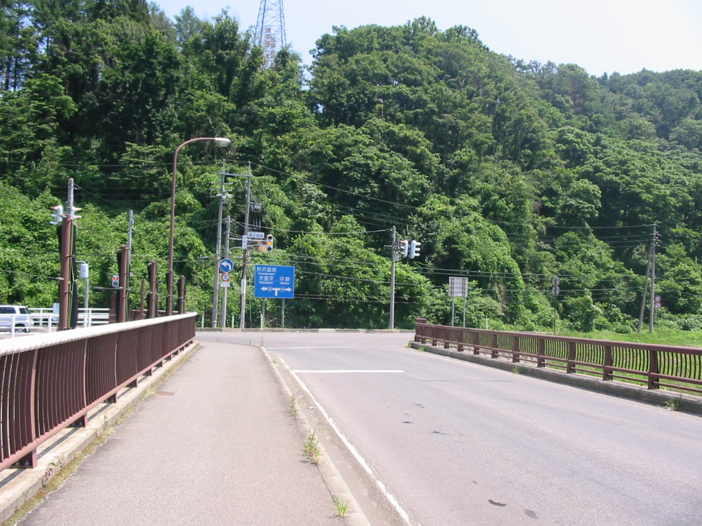 飯山市綱切橋